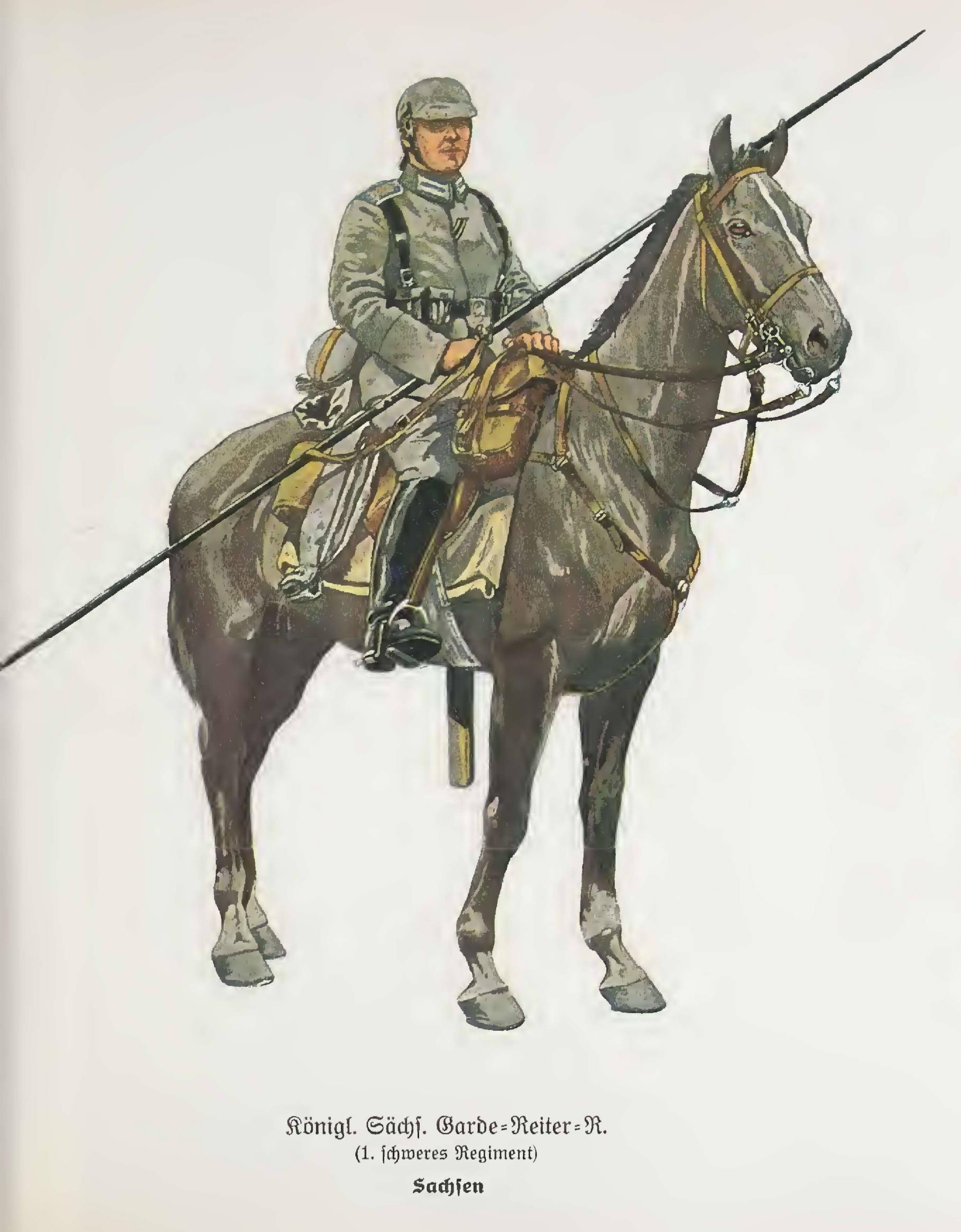 Reiter des Kgl. Sächsischen Garde-Reiter-Regiments in feldgrauer Uniform, 1915